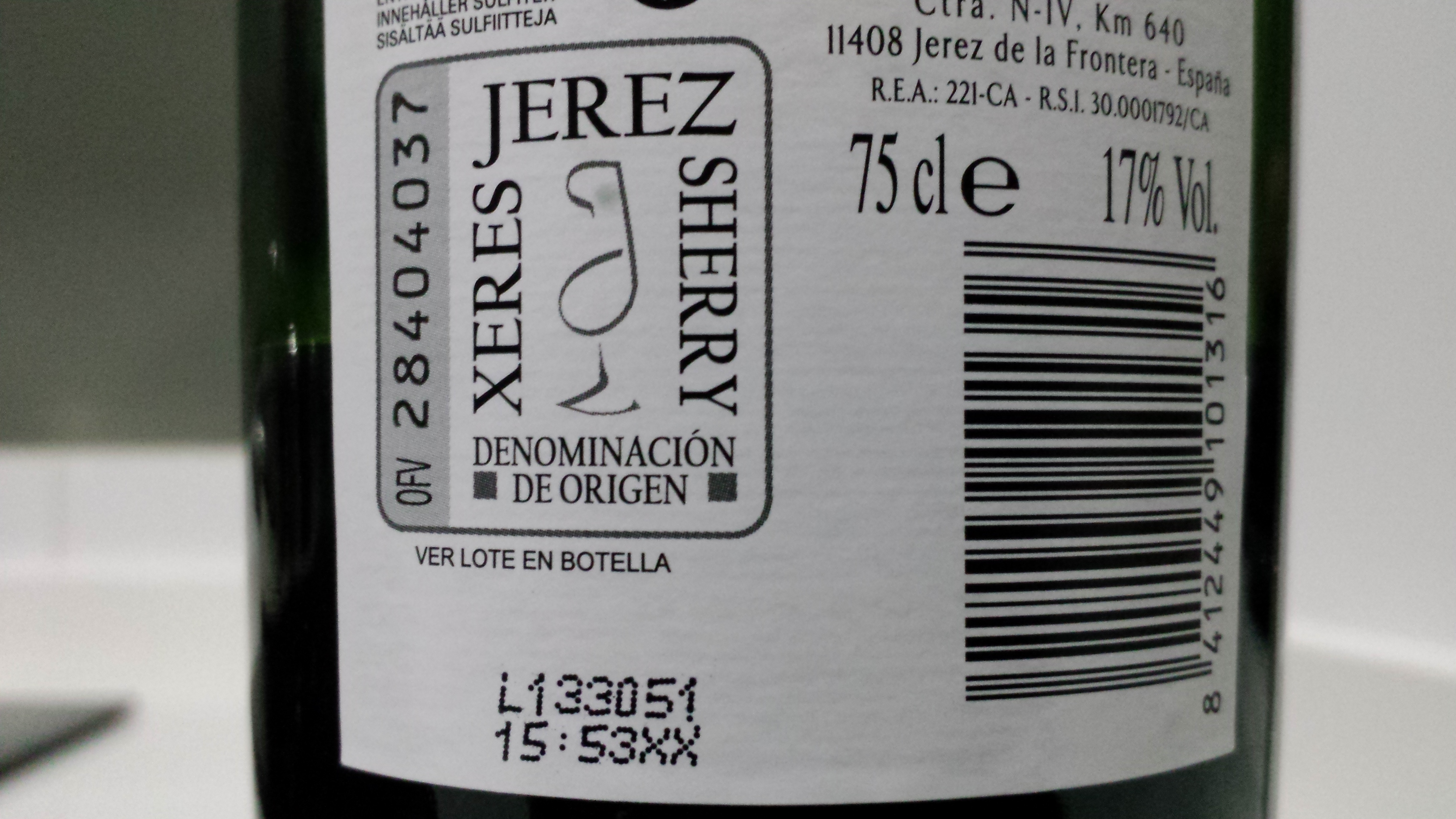 Etiqueta de la DO Jerez, Cádiz, España